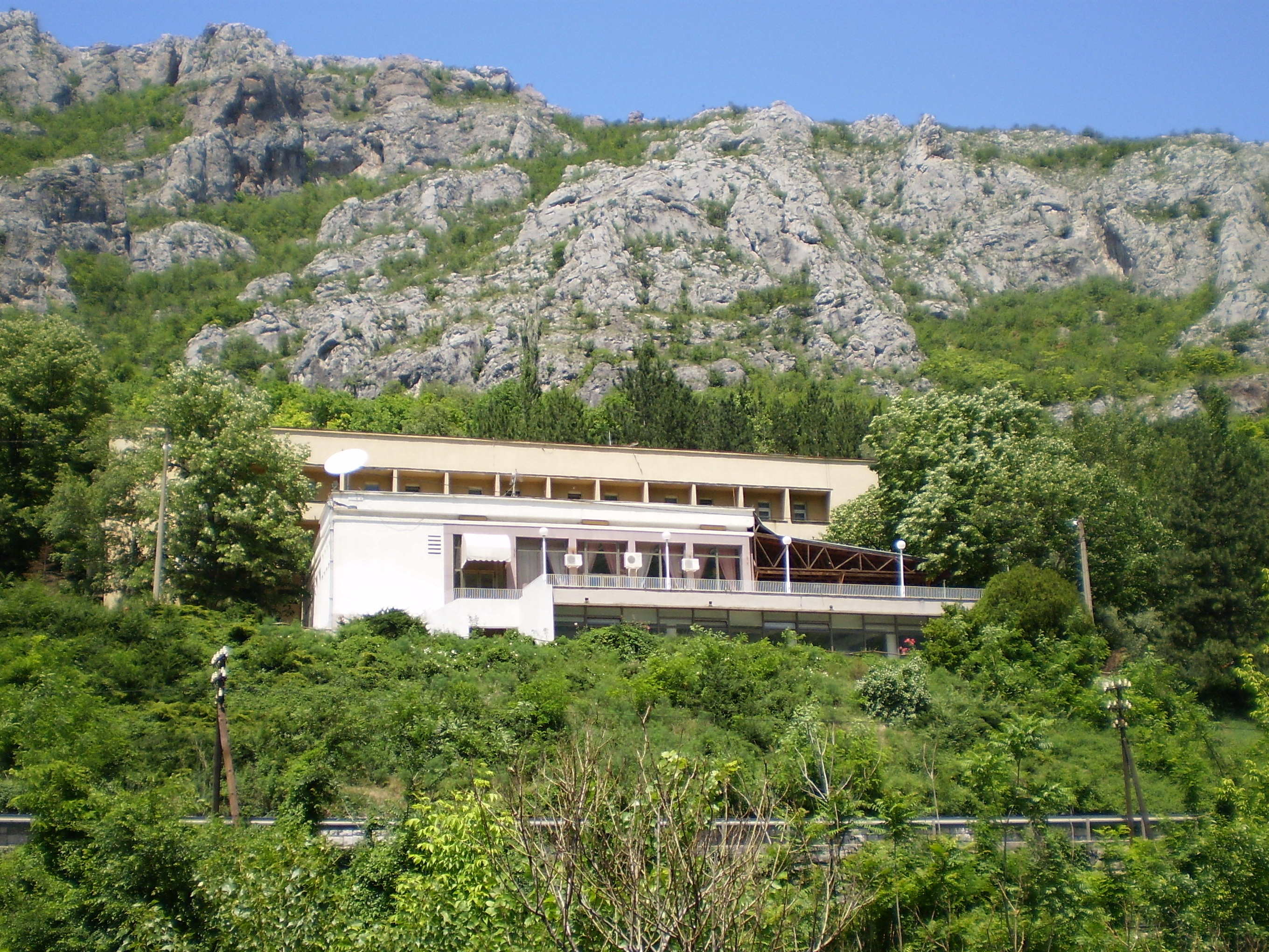 Hotel „Sićevo“ u Sićevačkoj klisuri. 3.6.2012